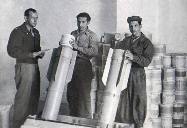 Präparierung von "Bomben" mit der Zeitschrift "Das Neue Deutschland", im Rahmen der OSS- "Operation Pig Iron"